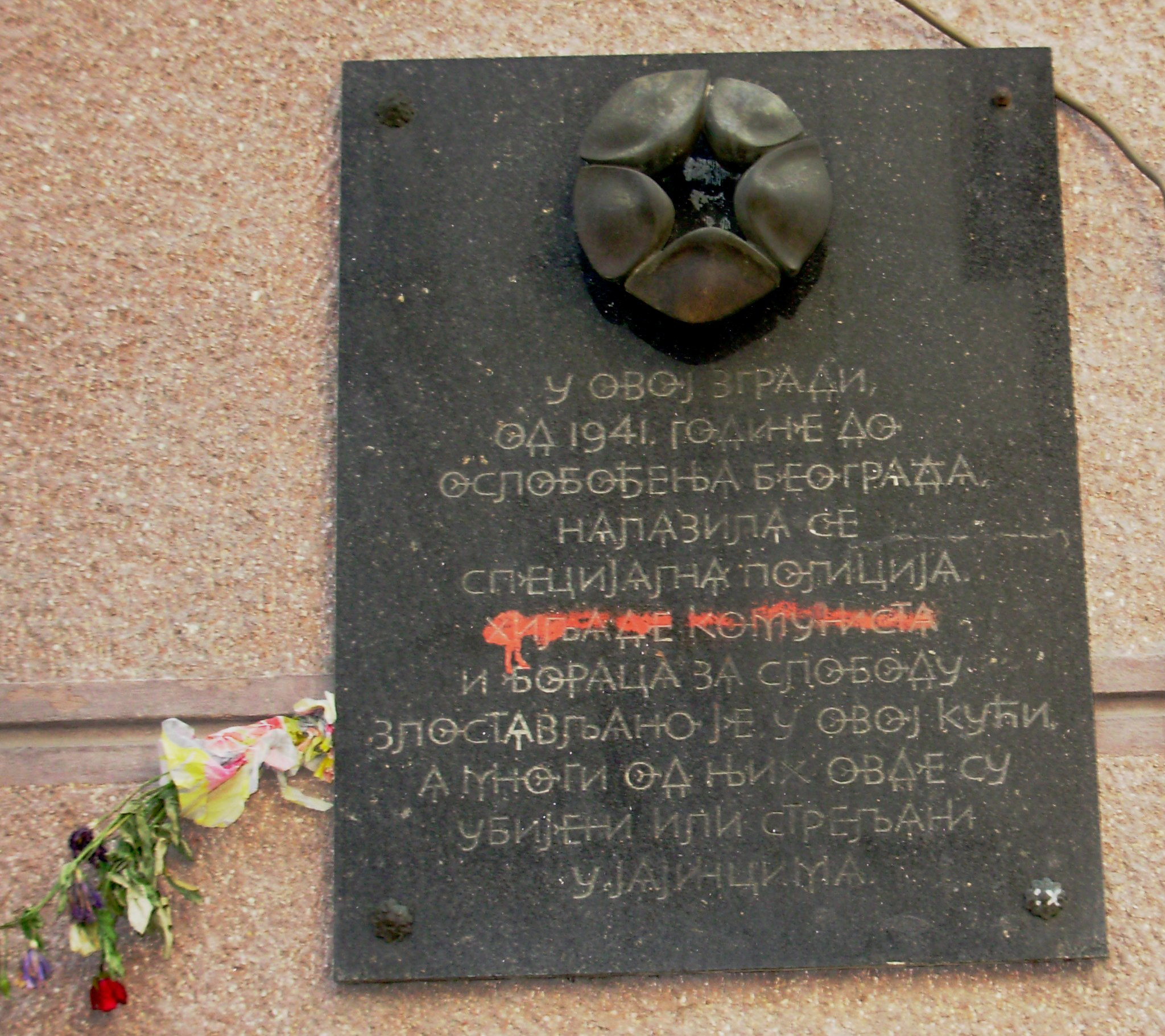 Табла на згради Танјуга, Обилићев венац, Београд. Сликао Голдфингер